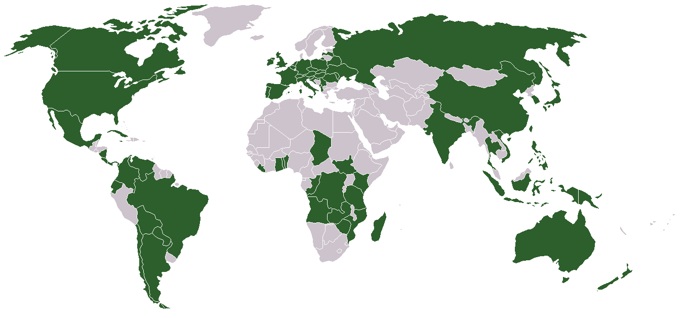 Misioneros del Verbo Divino, distribución en el mundo.